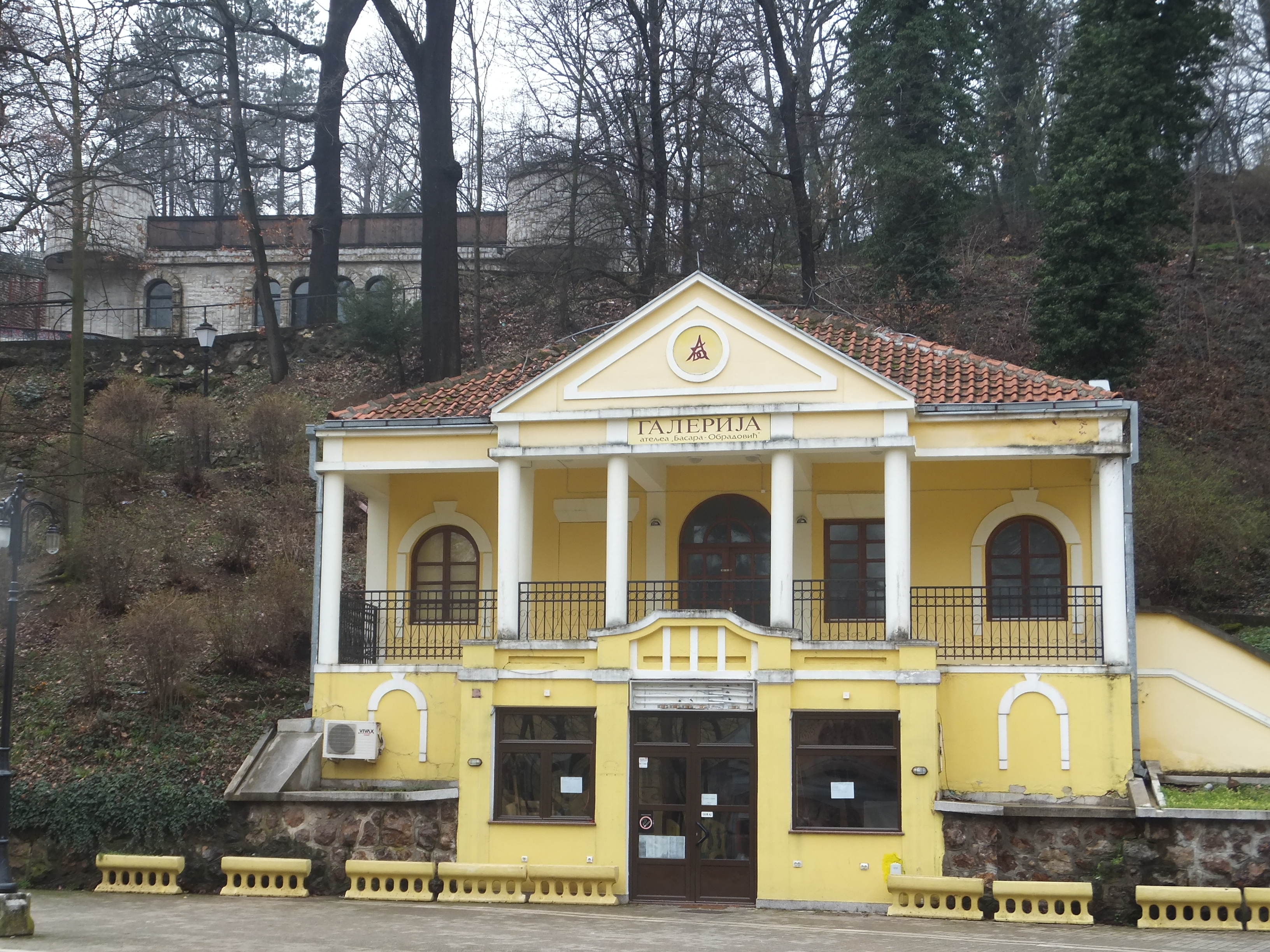 Чајкино брдо